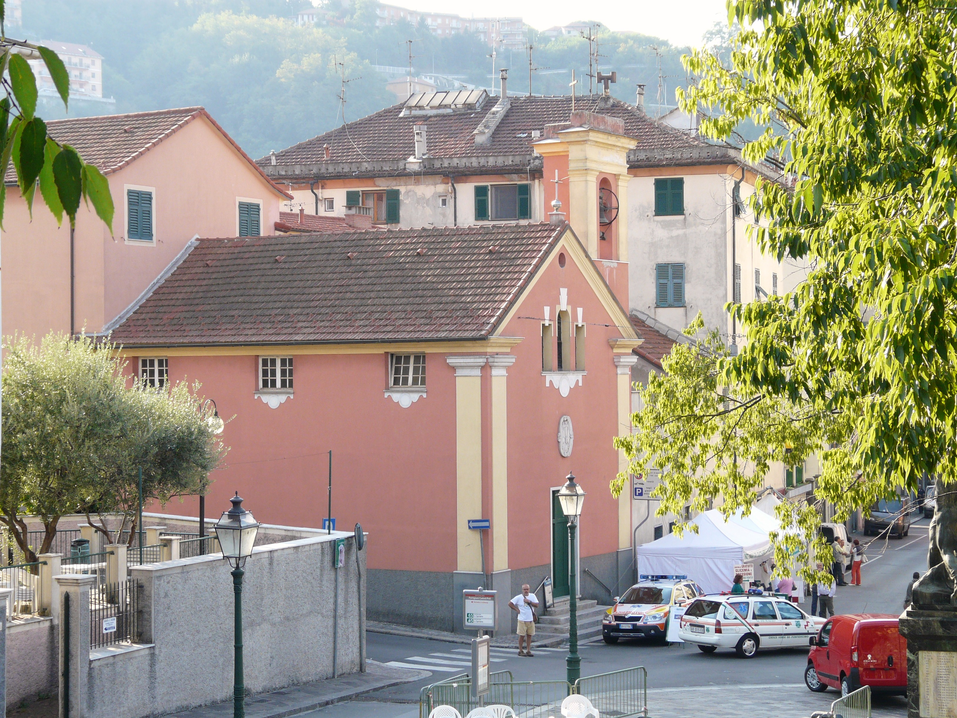 Oratorio, Pontedecimo, Genova, Liguria, Italia